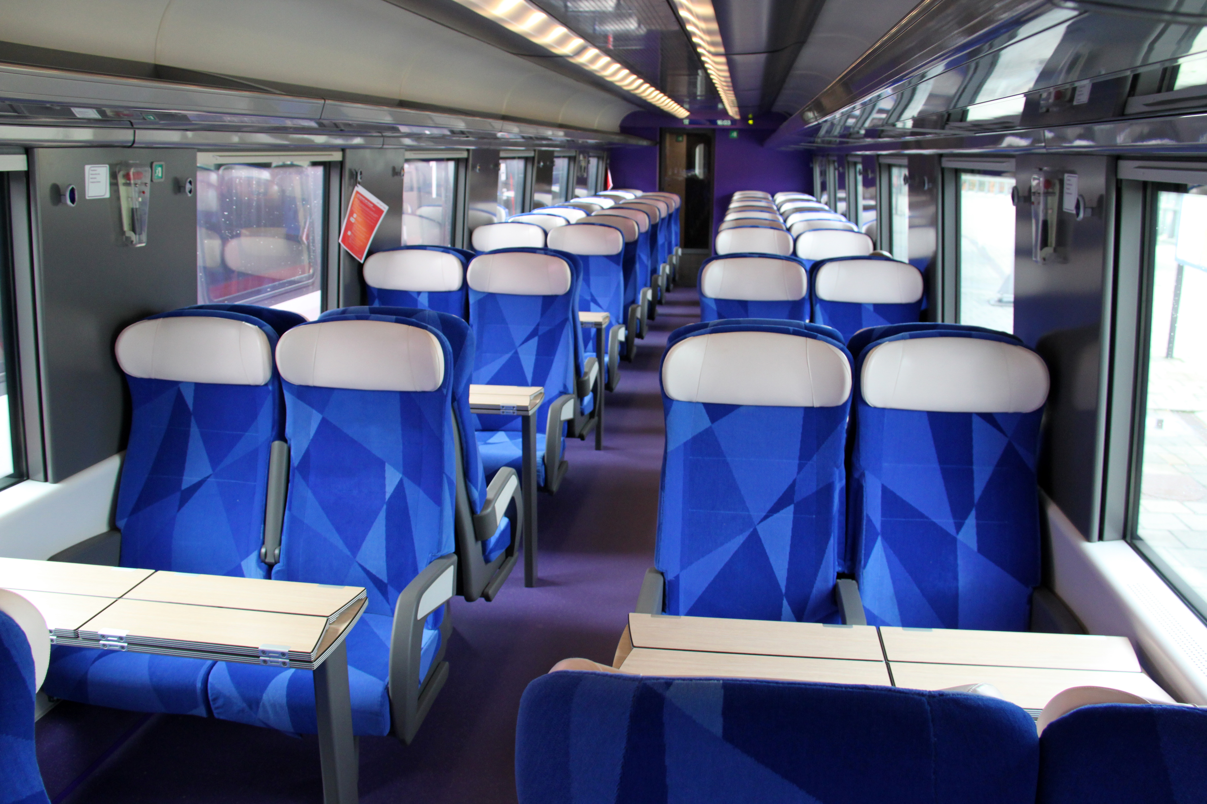 Interieur van de V250, hogesnelheidstrein van NMBS en NS Hispeed. 2e klasse.